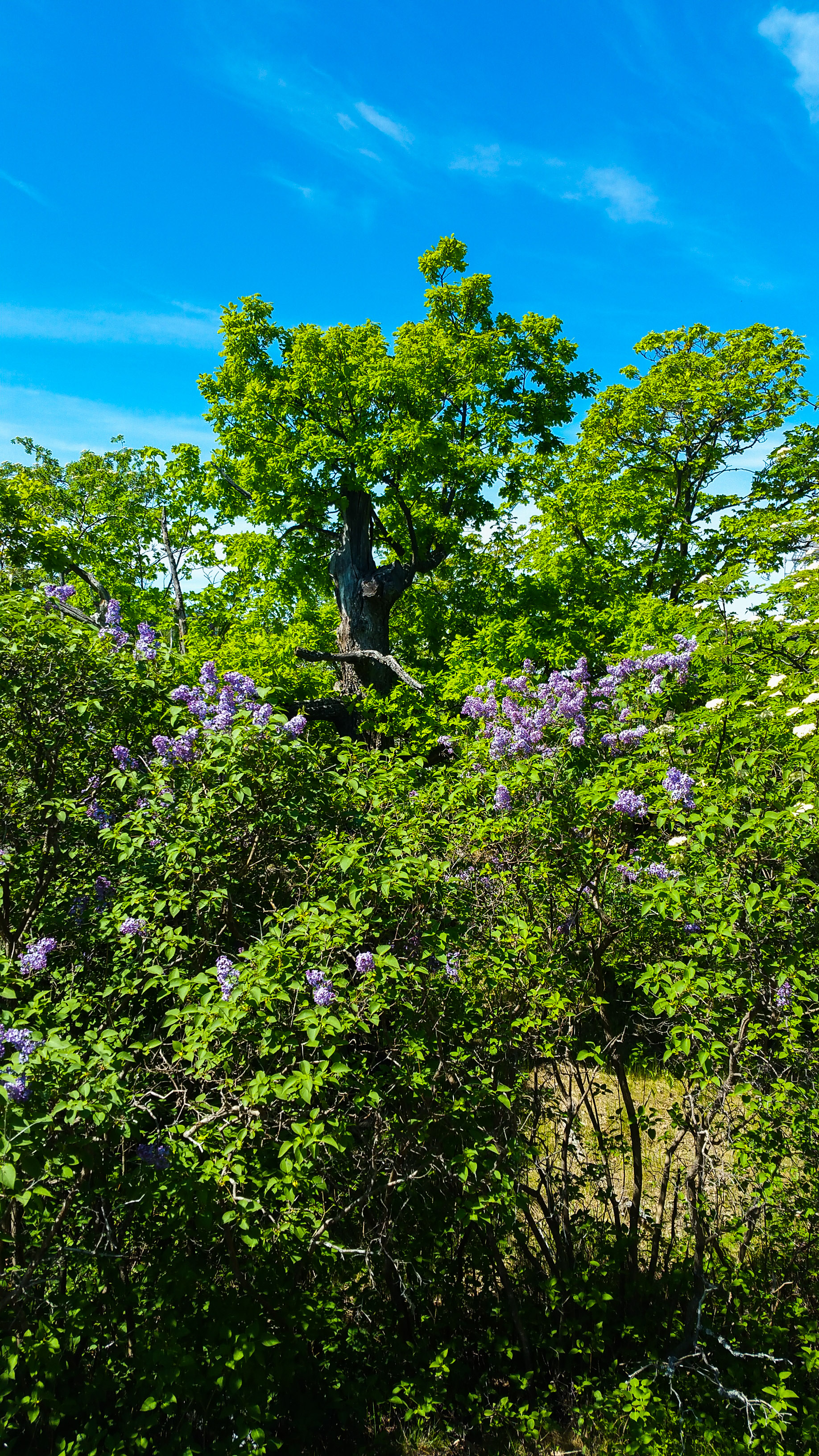 Sirenbuskar i Fredriksberg på Kvarnholmen i Nacka